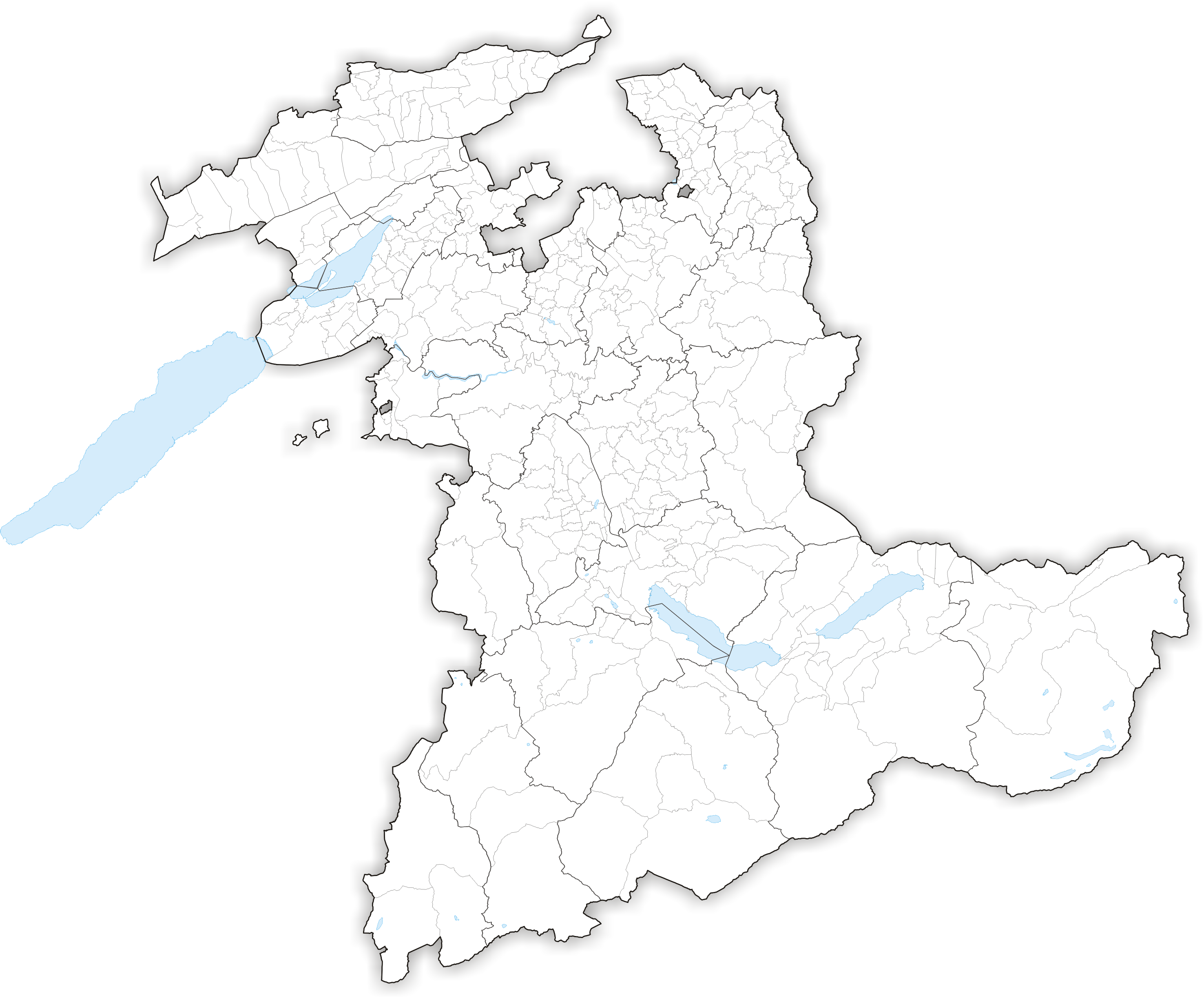 Municipalities in Canton Berne until 2007 / Gemeinden des Kantons Bern bis 2007